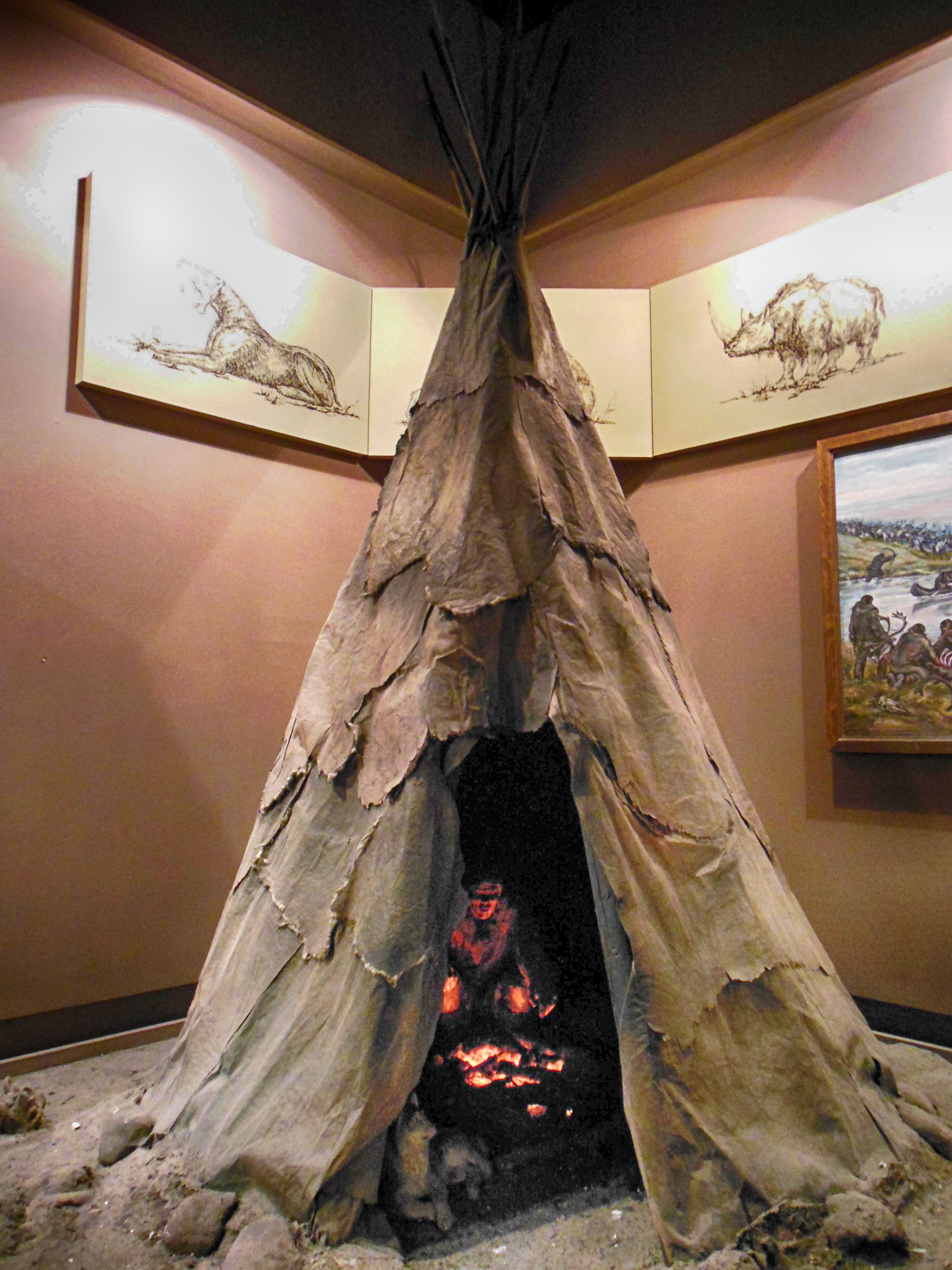 Беларуская (тарашкевіца): Экспазыцыя Магілеўскага абласнога краязнаўчага музэя